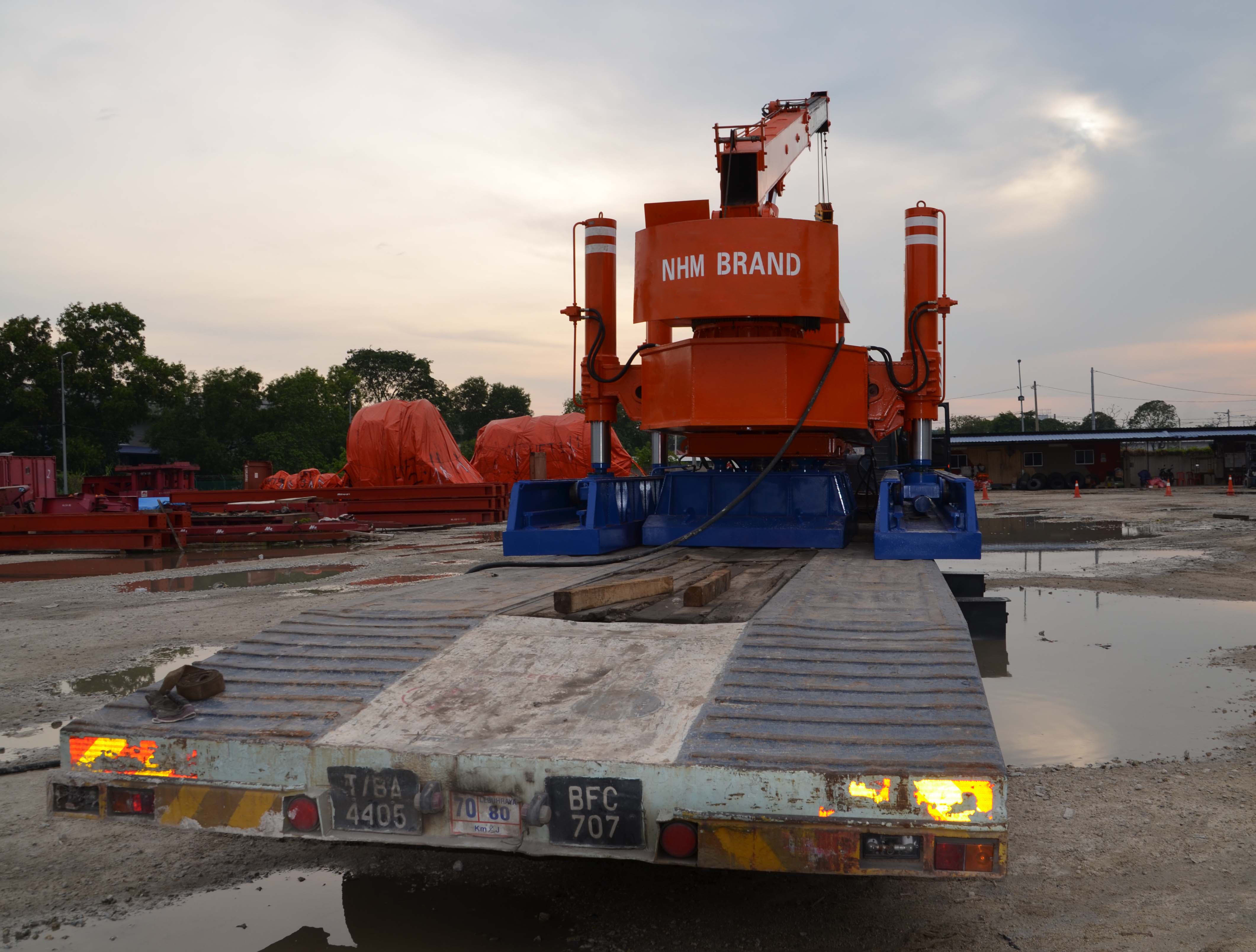 Компактная установка на полуприцепе